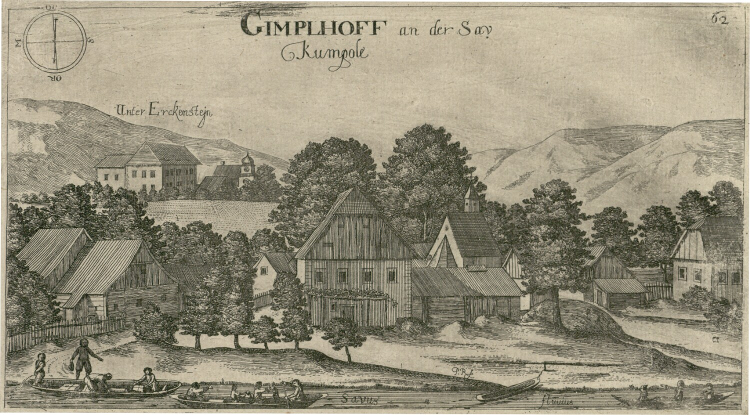 Dvor Kompolje (Gimpelhof)